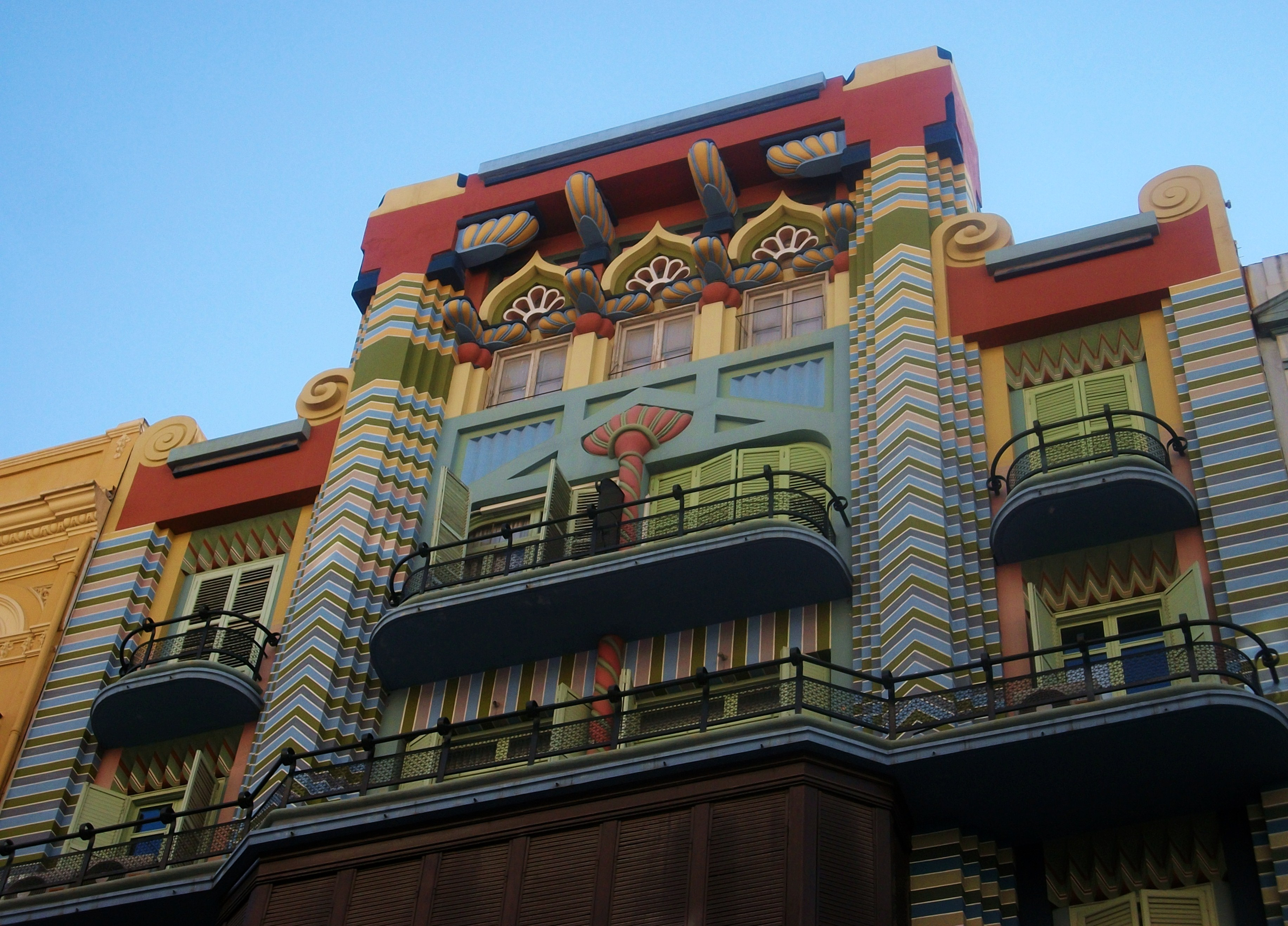 Part superior de la casa jueva de València. De Joan Francesc Guardiola (Sueca, 1895-1962), construïda el 1930, carrer Castelló de València.